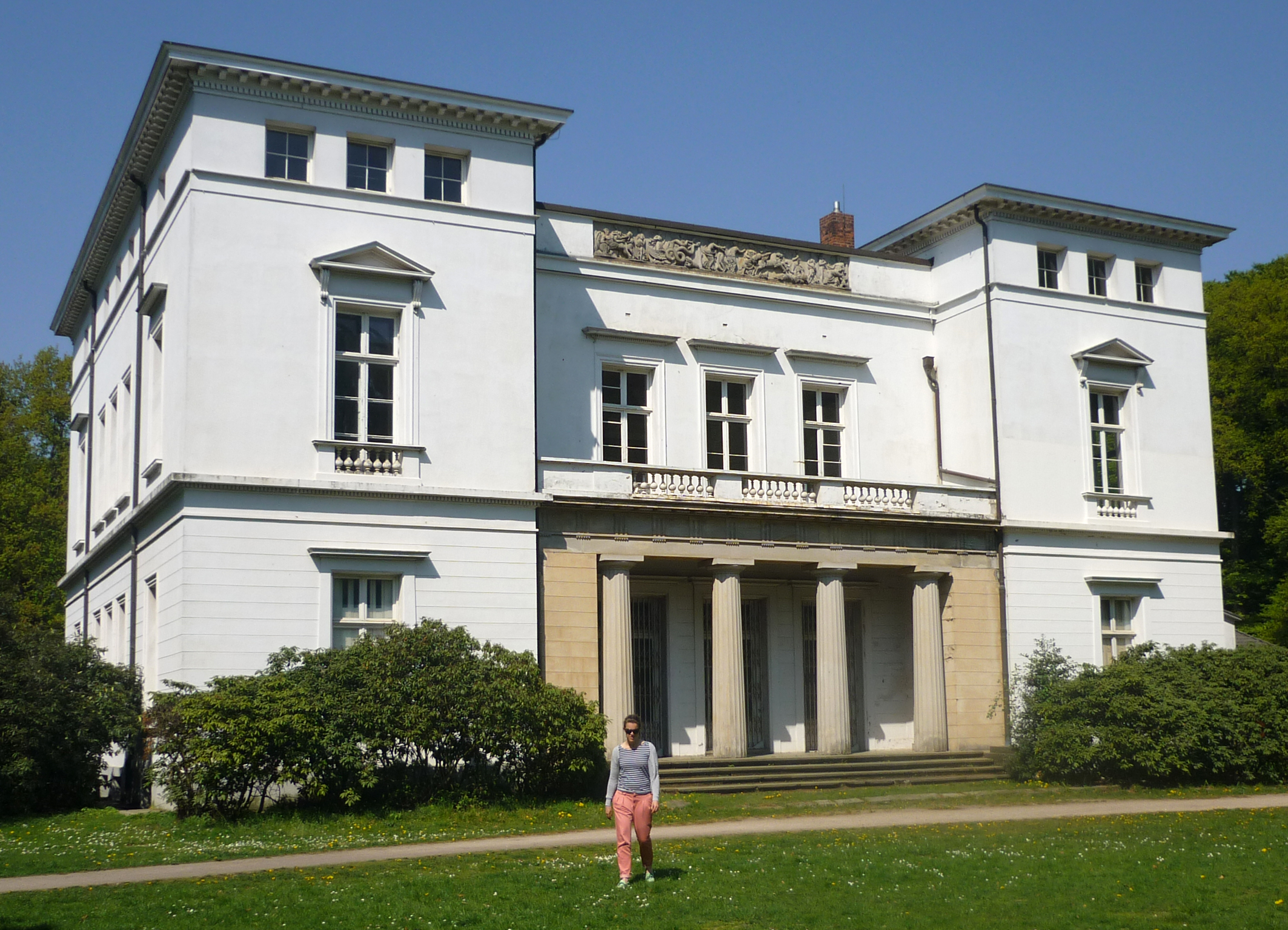 Katharinenhof, Mühlenberger Weg 33. Der Altonaer Kaufmann Georg Friedrich Baur ließ 1829-36 diesen klassizistischen Putzbau durch Ole Jörgen Schmidt und Johann Matthias Hansen, einem Neffen Christian F. Hansens, errichten.